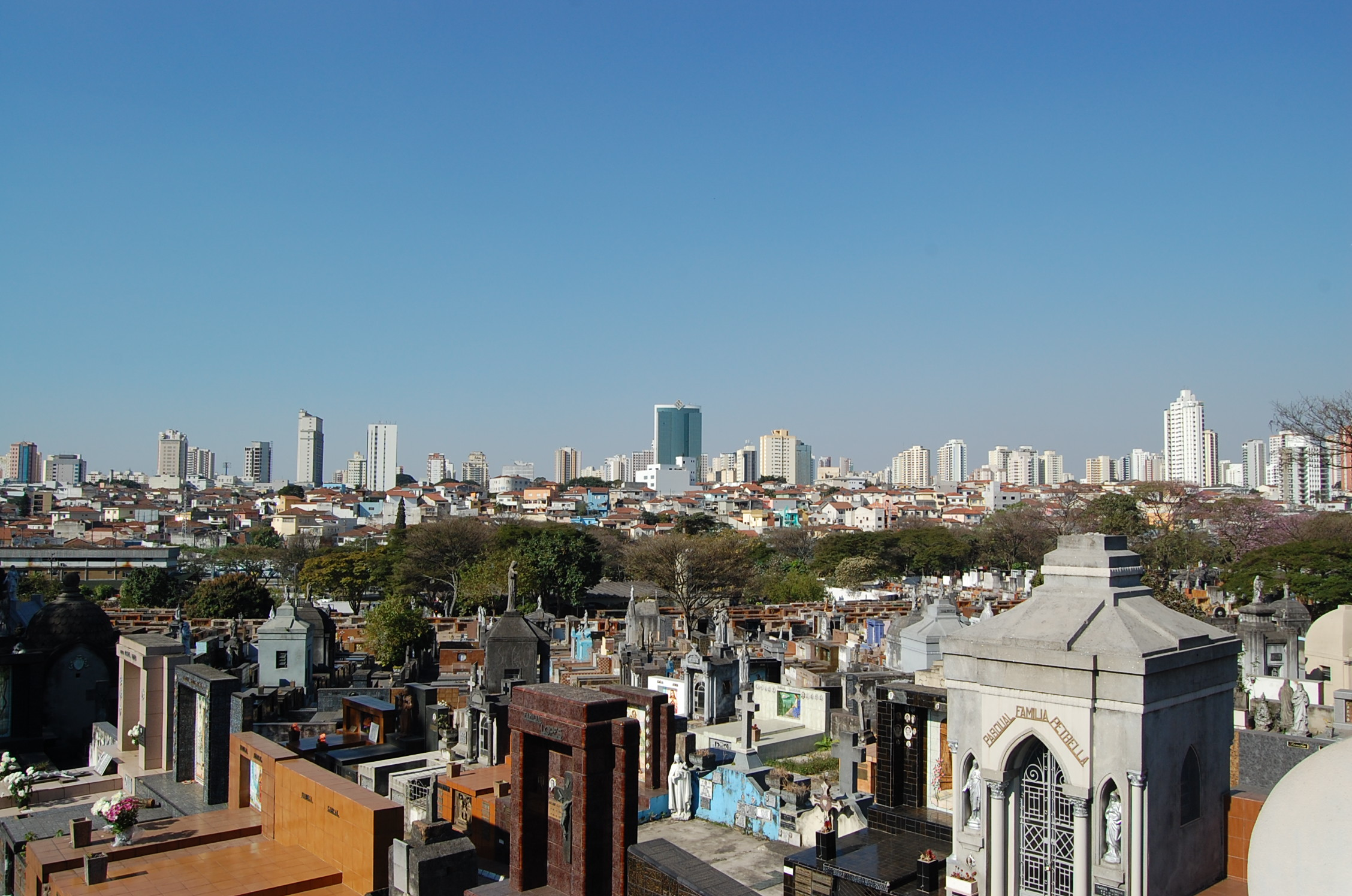 Vista geral do Cemitério da Quarta Parada (Belenzinho/Mooca, São Paulo, Brasil). Ao fundo da imagem é possível ver o bairro do Tatuapé.